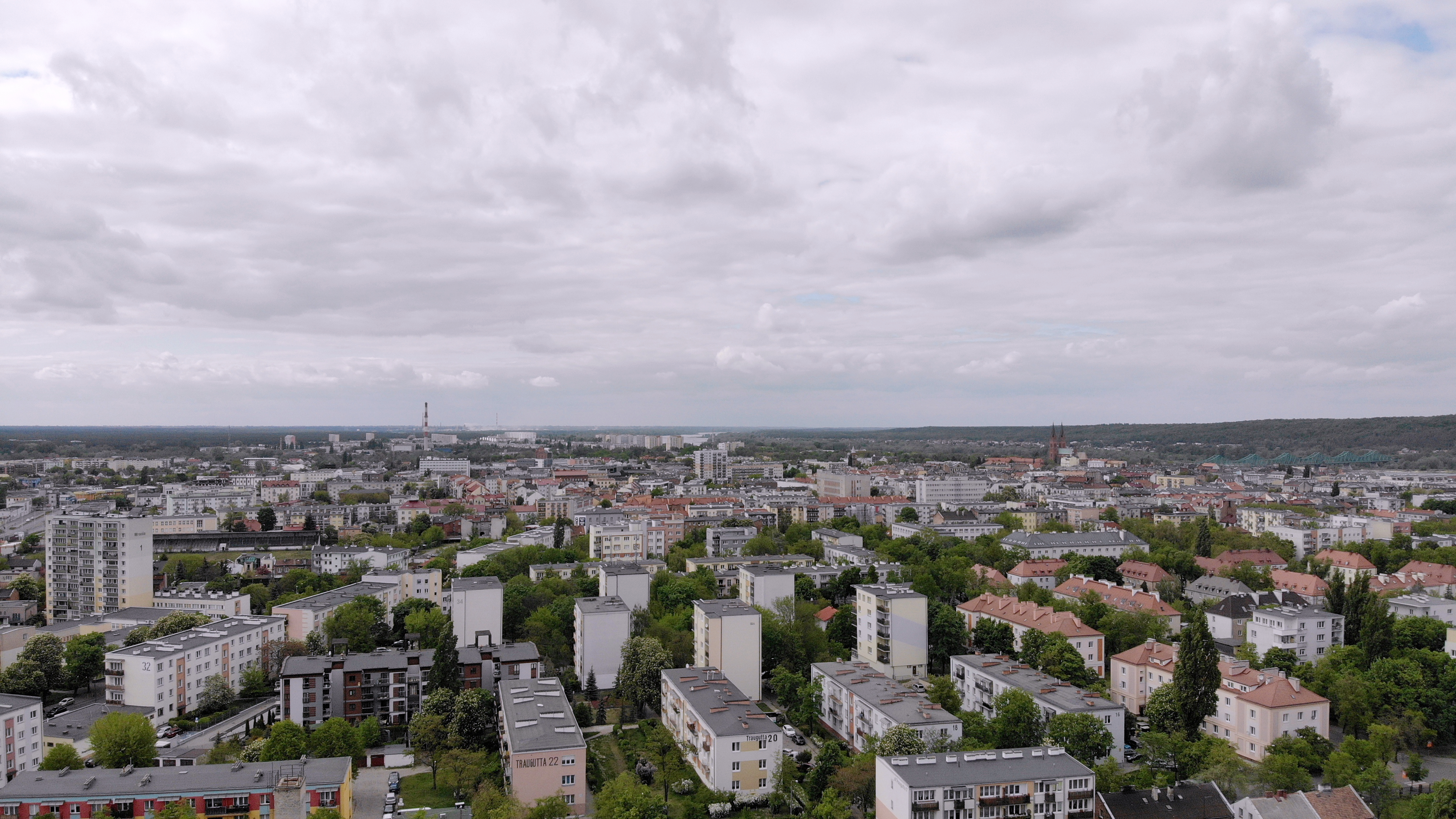 Śródmieście (2020 r.)